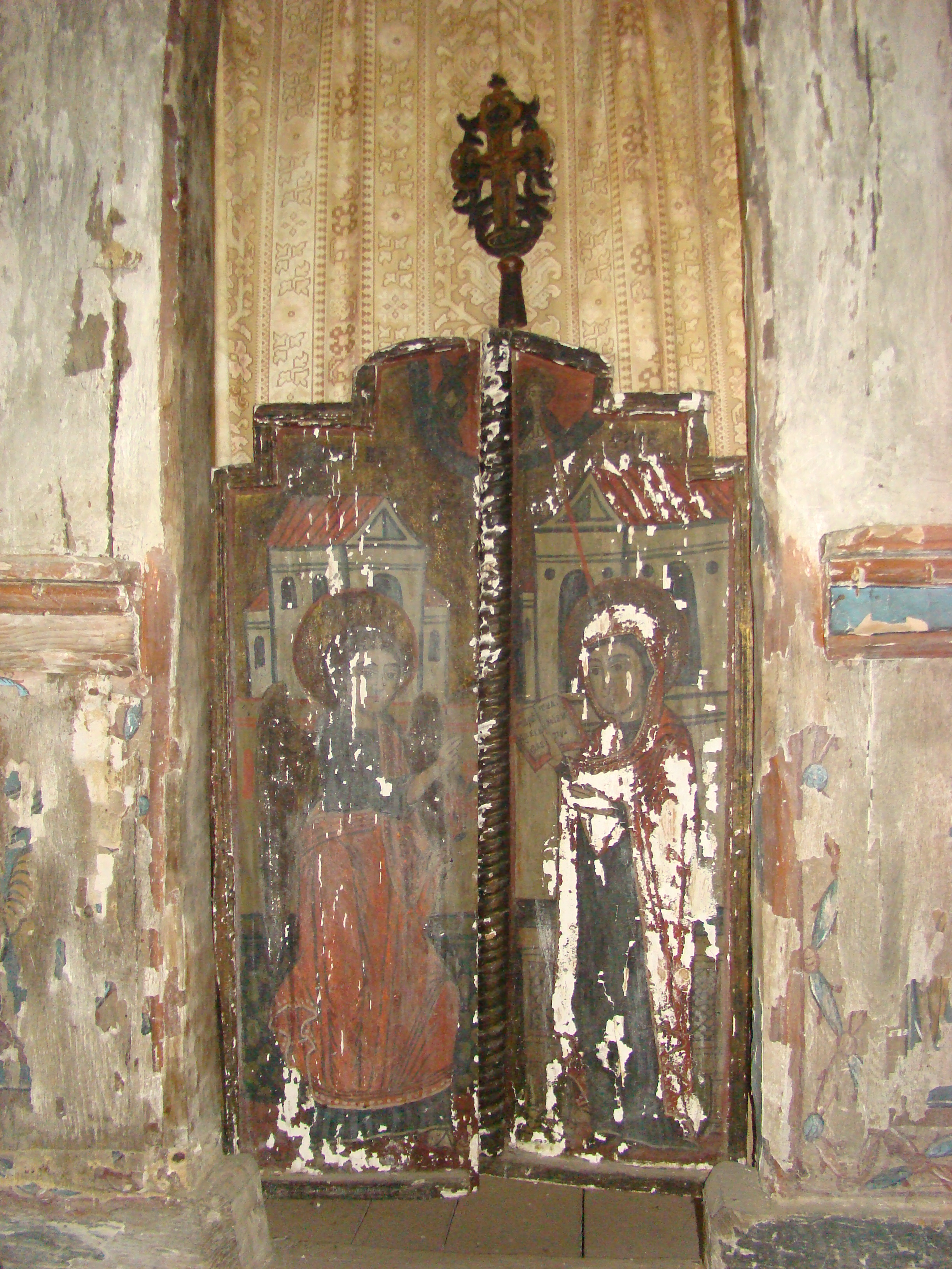 Biserica de lemn „Sfinții Arhangheli” din Săliștea, județul Alba